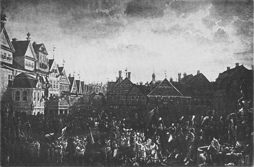 Duke Friedrich Franz at the market place of Schwerin in 1807